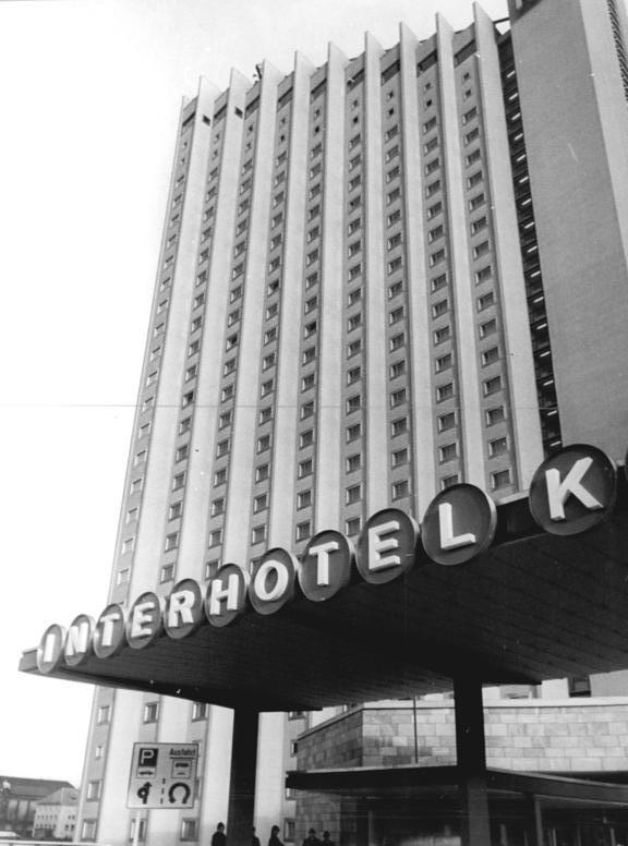 Chemnitz, Hotel "Kongreß" ADN-ZB Thieme 10.2.7 Karl-Marx-Stadt: Das neue Interhotel "Kongreß" in Karl-Marx-Stadt wurde am 10.2.74 eröffnet. Das 27. Interhotel der DDR bietet in 380 konfortabel eingerichteten Zimmern und Appartements 760 Gästen Platz. Mehrere Restaurants und Salons, eine Speisen- und Hallenbar sowie eine Nachtbar im 26. Stock, die tagsüber als Cafe genutzt wird, gehören zu den gastronomischen Einrichtungen, die etwa Personen 1000 Platz bieten.